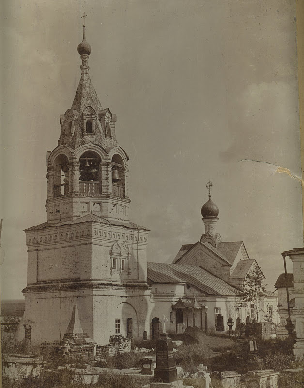 Церковь Введения во храм Пресвятой Богородицы в Воскресенском монастыре в Муроме